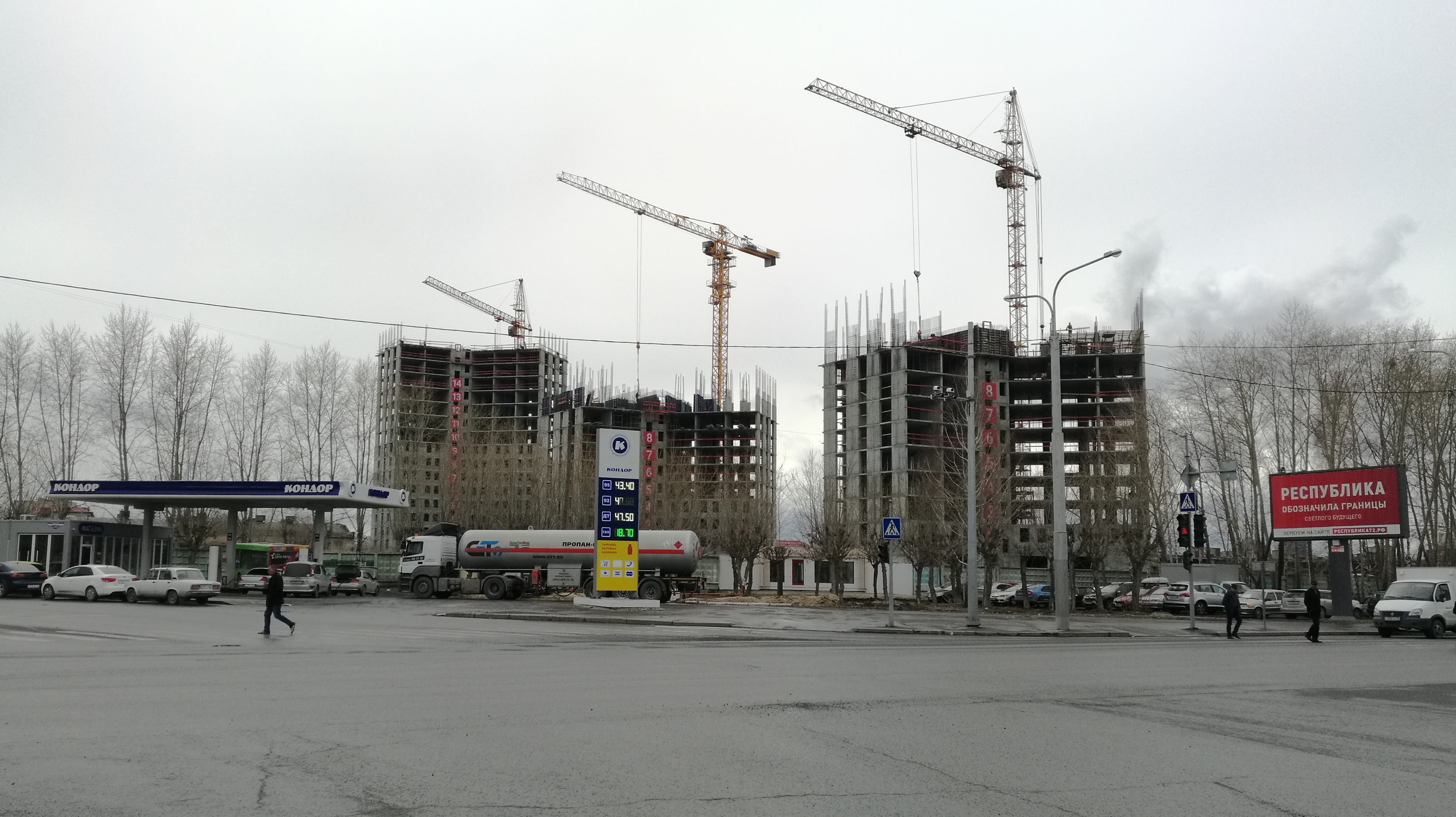 Konstruado de kvartalo "Respubliko". Tjumeno, Rusio.